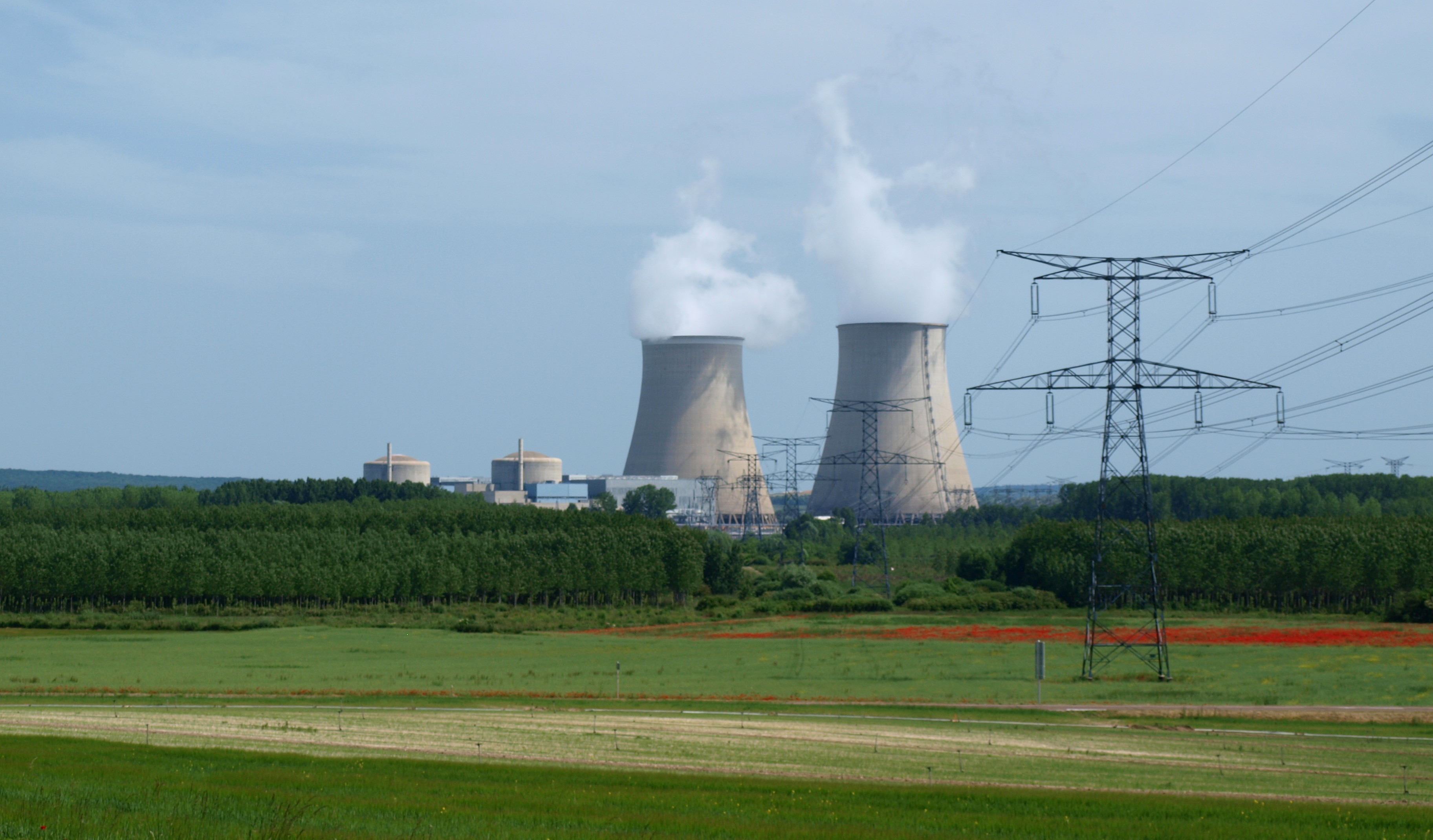 Nogent-sur-Seine (Aube, France) , la centrale nucléaire.